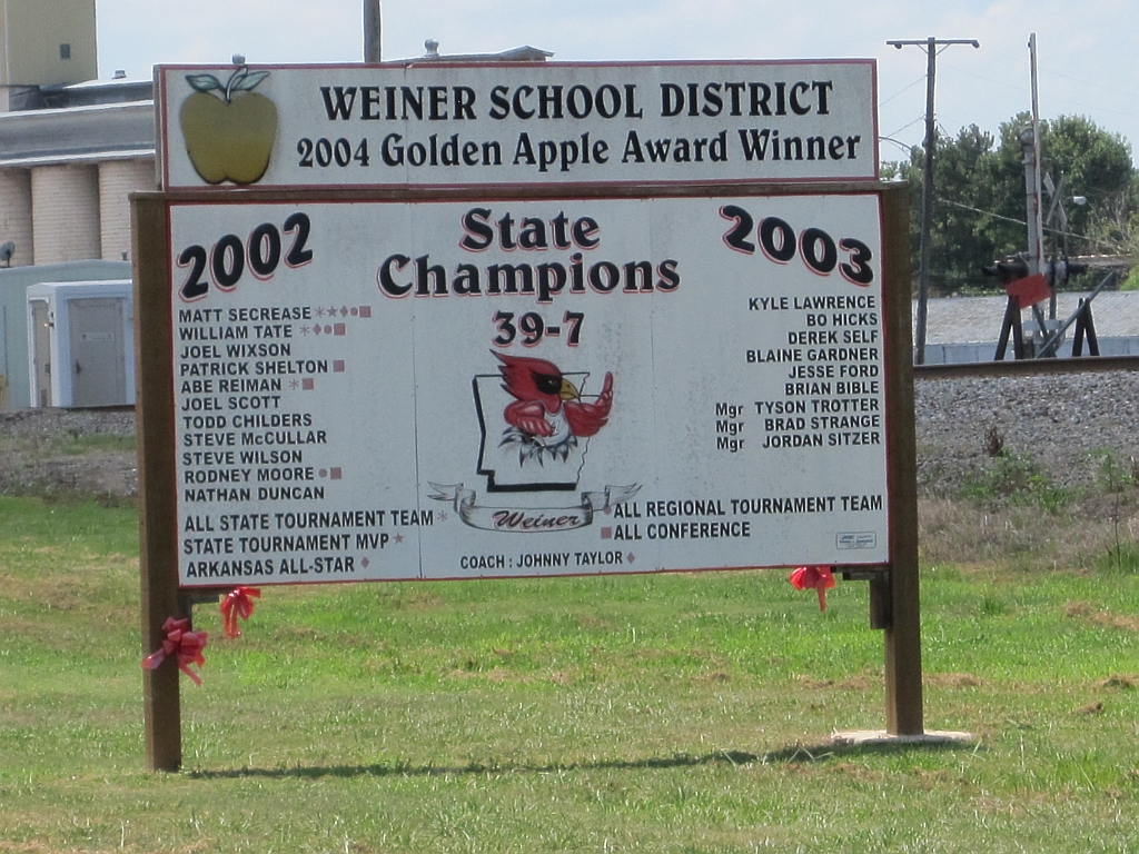 Weiner, Arkansas